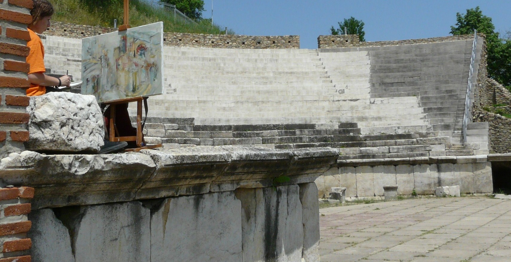 Heraclea, Bitola